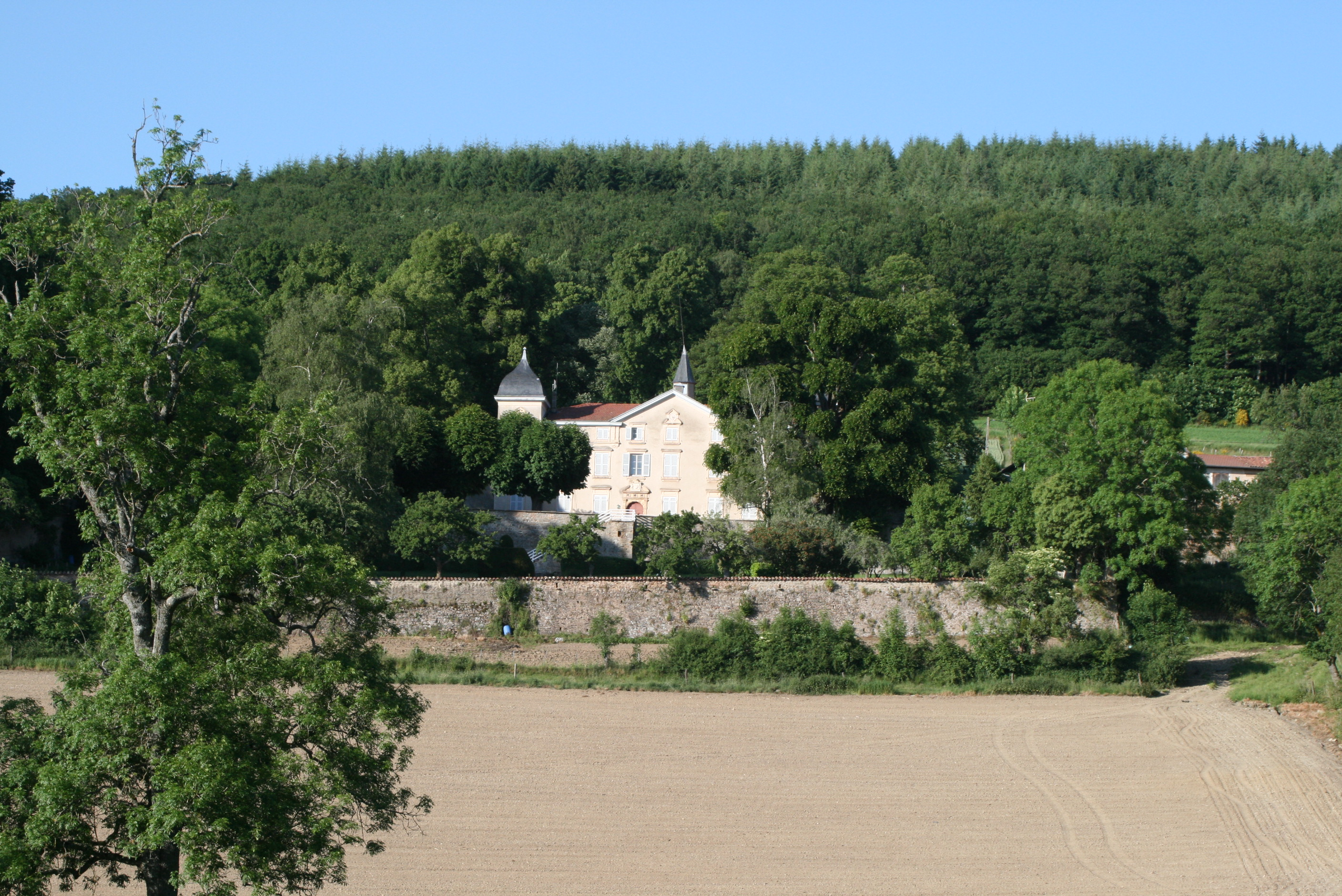 Le château de Villette ancienne maison forte médiévale à l'époque des Talaru